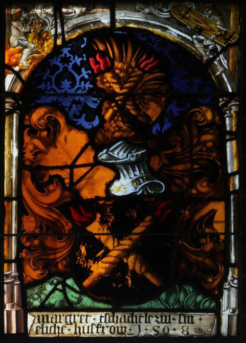 Kirche Kirchberg BE, Tschachtlan-Scheibe